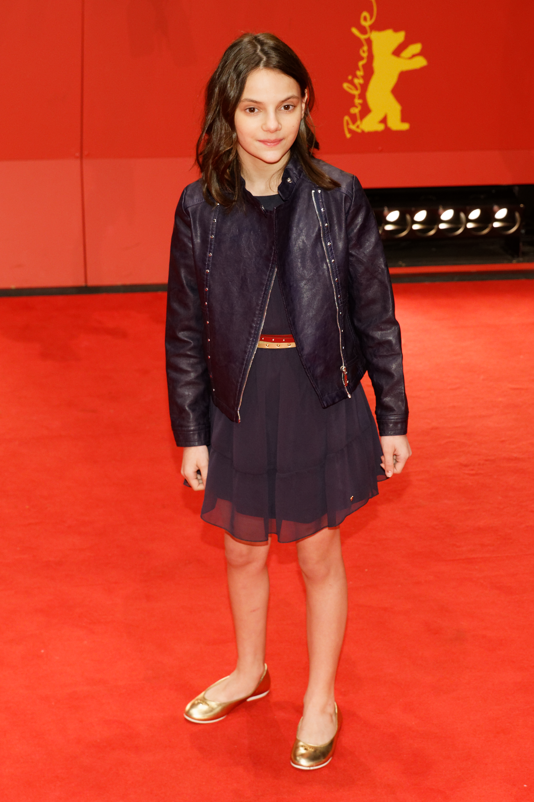 Dafne Keen auf dem roten Teppich zur Weltpremiere von Logan bei der Berlinale 2017